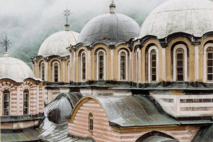 Bulgarien: Rila-Kloster, 1996; Aufnahme: R.P. Braun